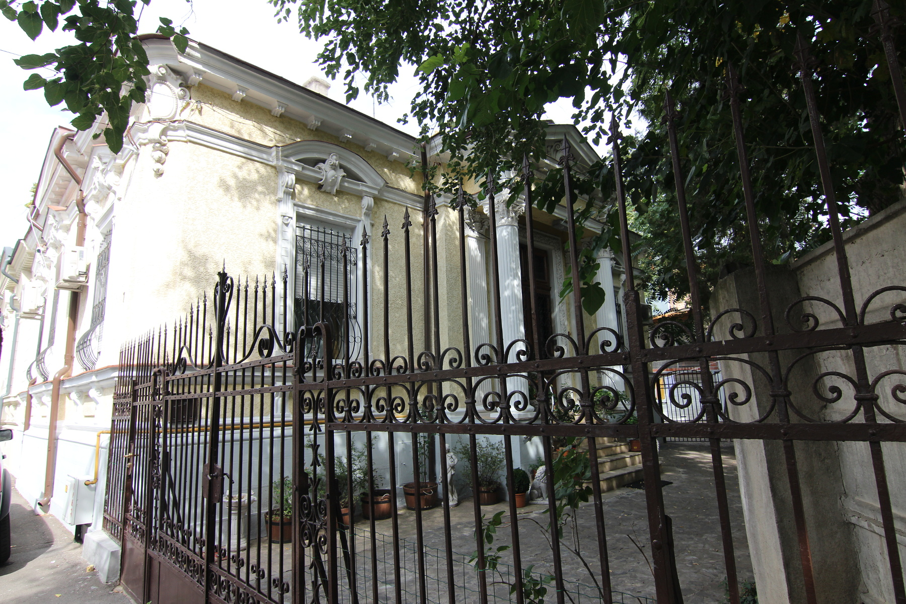 Casă pe Str Romulus